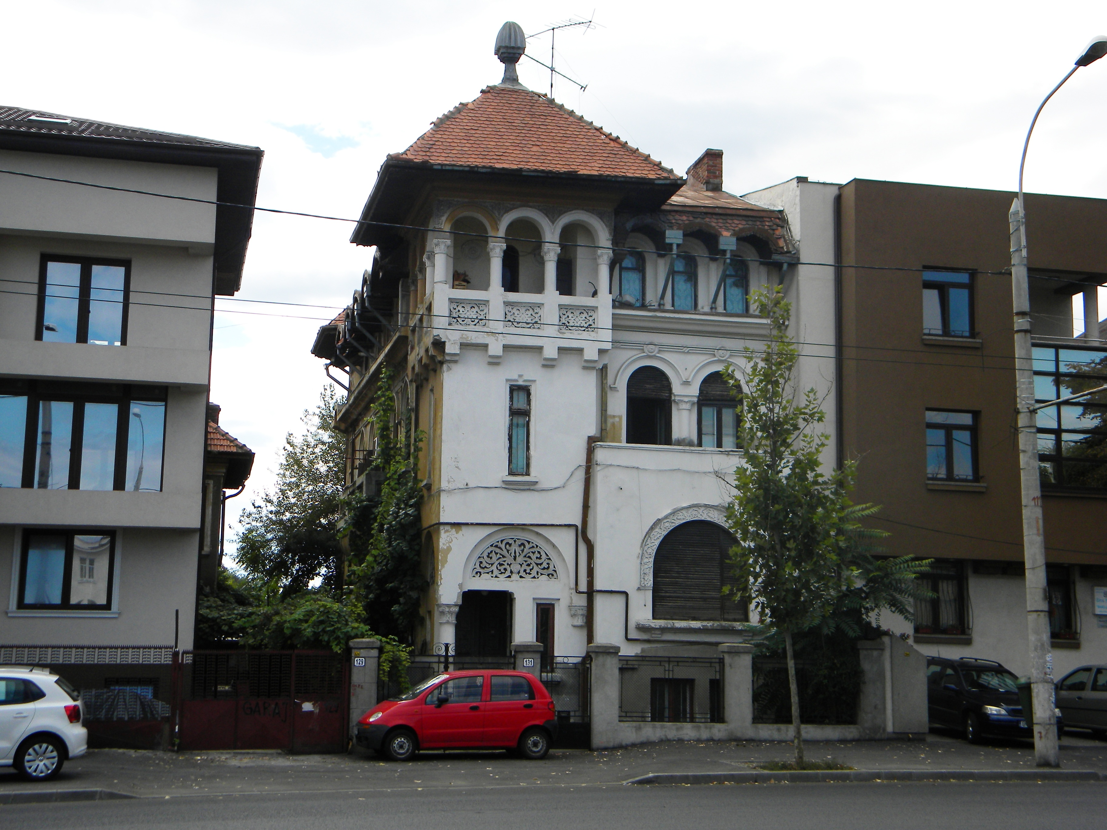 Bucuresti, Romania, Casa pe Calea Plevnei nr. 131, sect.1 (vedere de ansamblu)